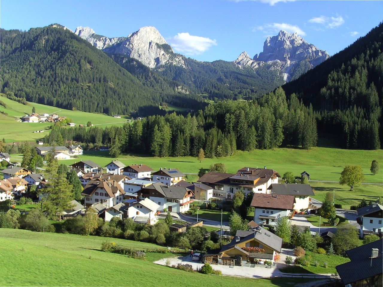 Prags in Südtirol; Ortschaft Schmieden (ital. Ferrara); Blick nach Südosten. Im Hintergrund links Sarlkofel und Lungkofel, rechts neben dem kleinen Sarlkopf der Dürrenstein.